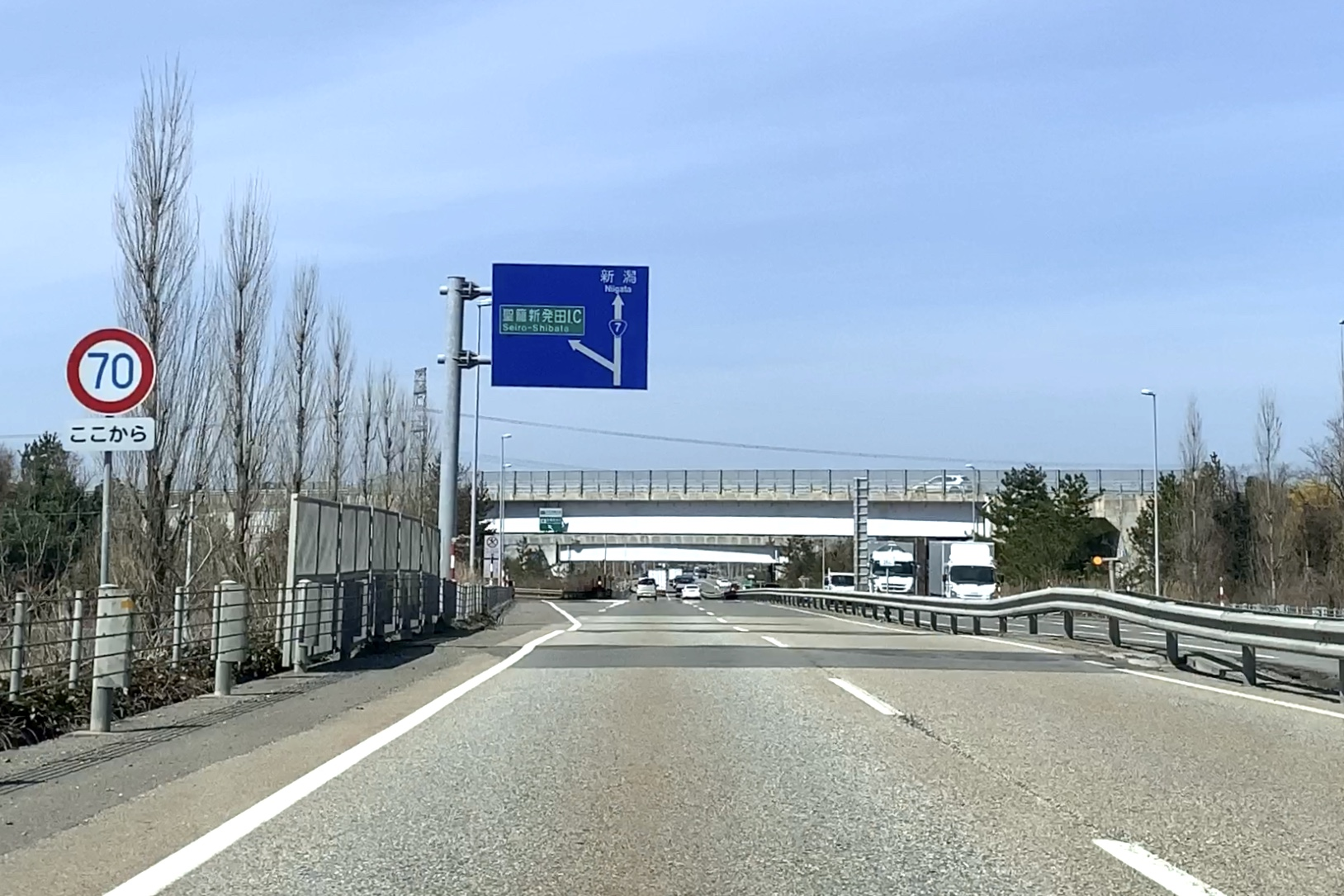 新新バイパス・聖籠新発田インターチェンジ（2020年3月）